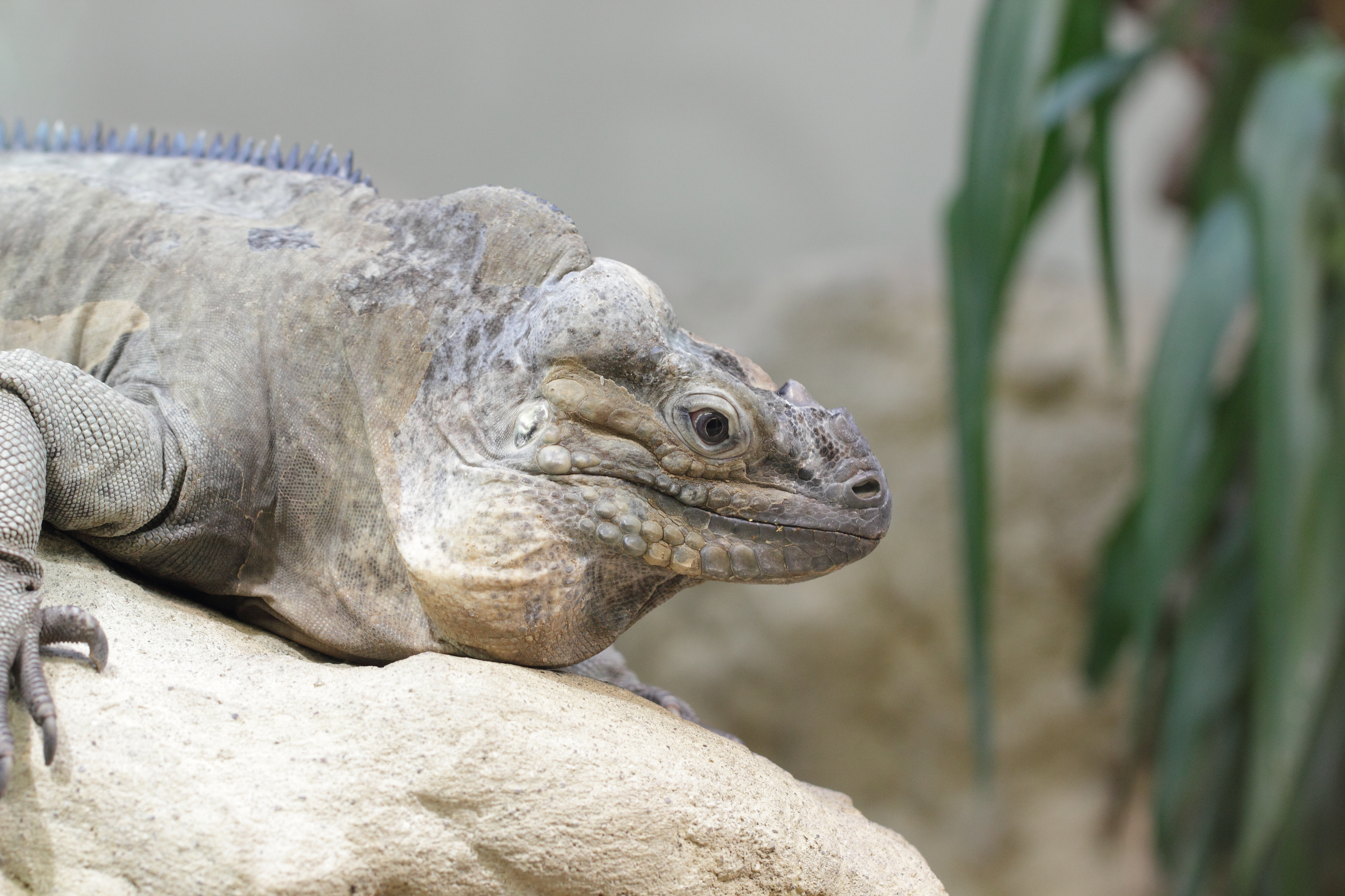 Ein Nashornleguan im Tiergarten Schönbrunn.